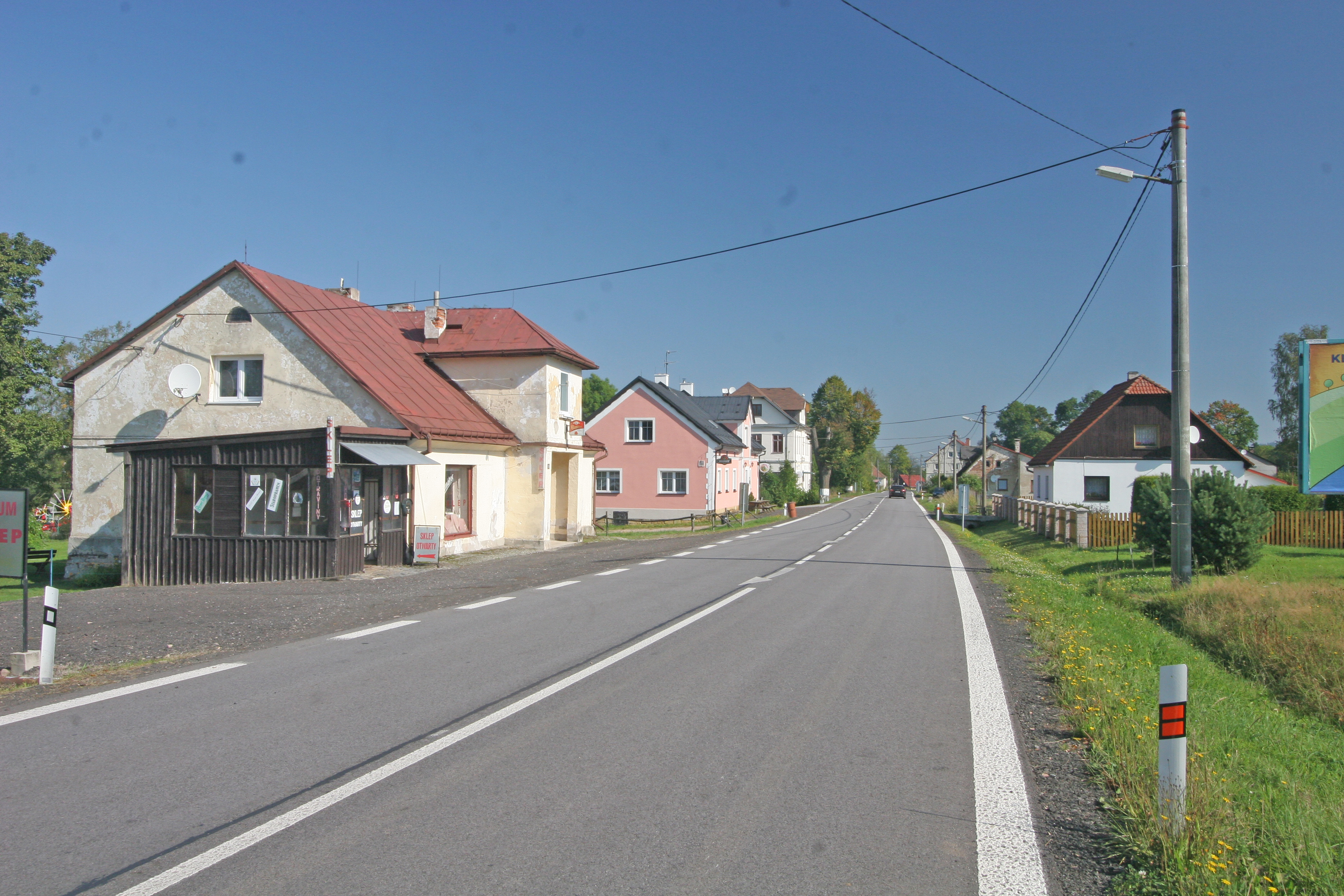 Královec čp. 126 ?